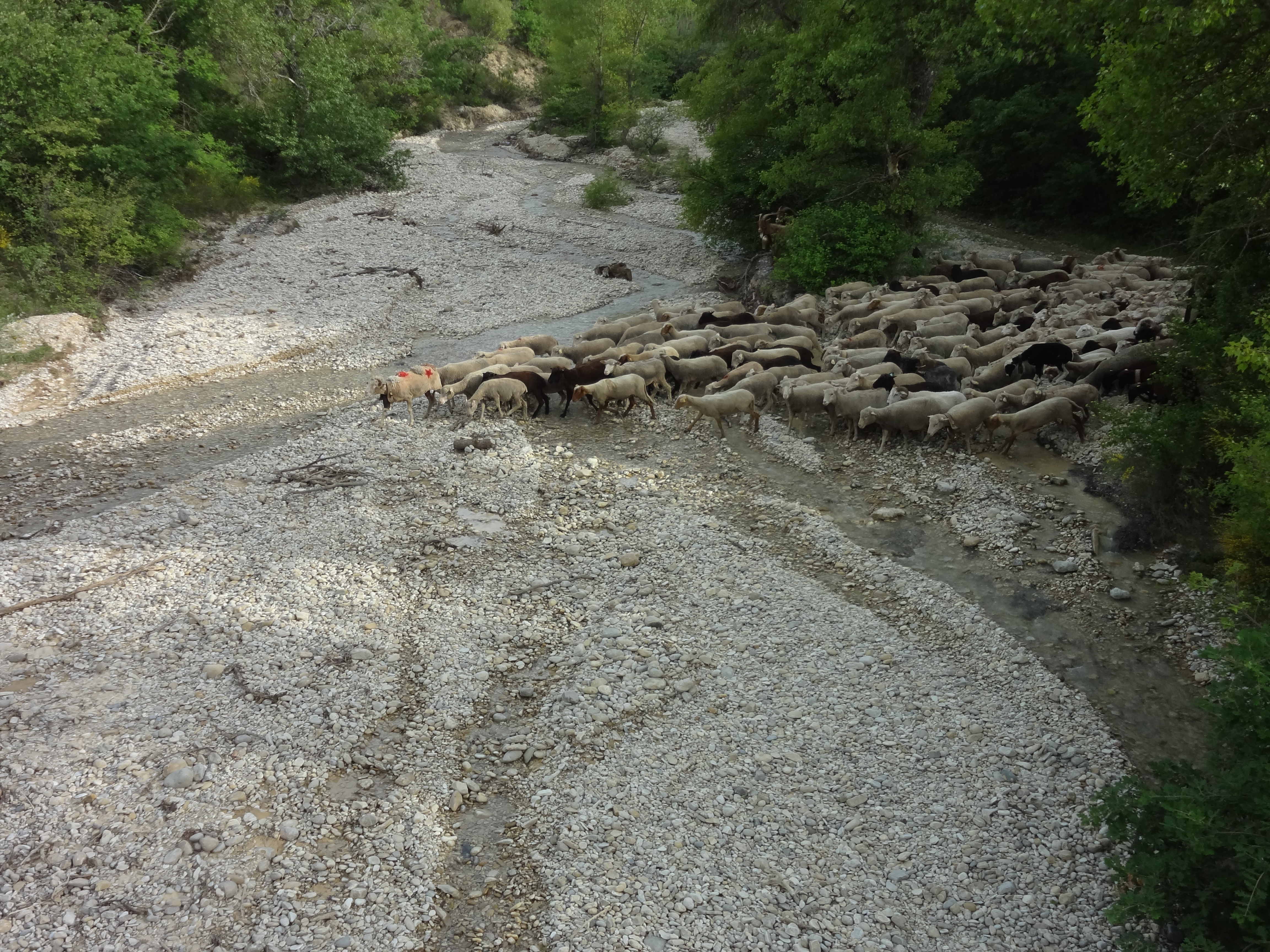 Franchissement d'un torrent (ravin de la Partie) par un troupeau de moutons